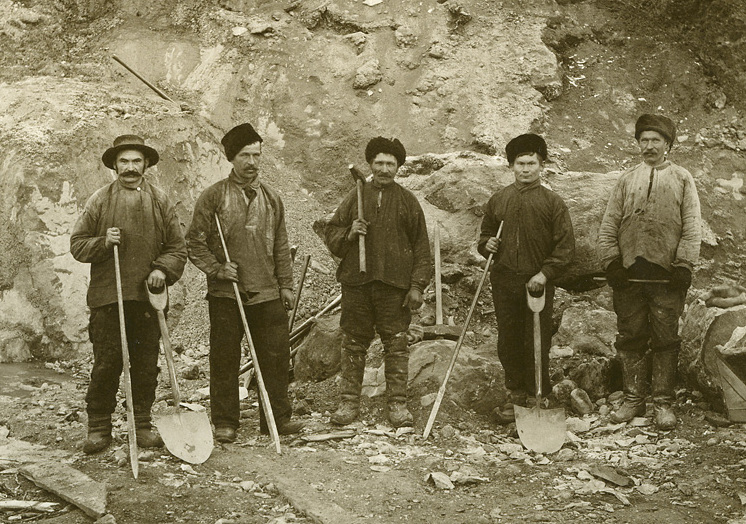 Wessel, Ellisif Rannveig Gruppeportrett av fem arbeidskarer. Kirkenes 1907. NMFF.002147